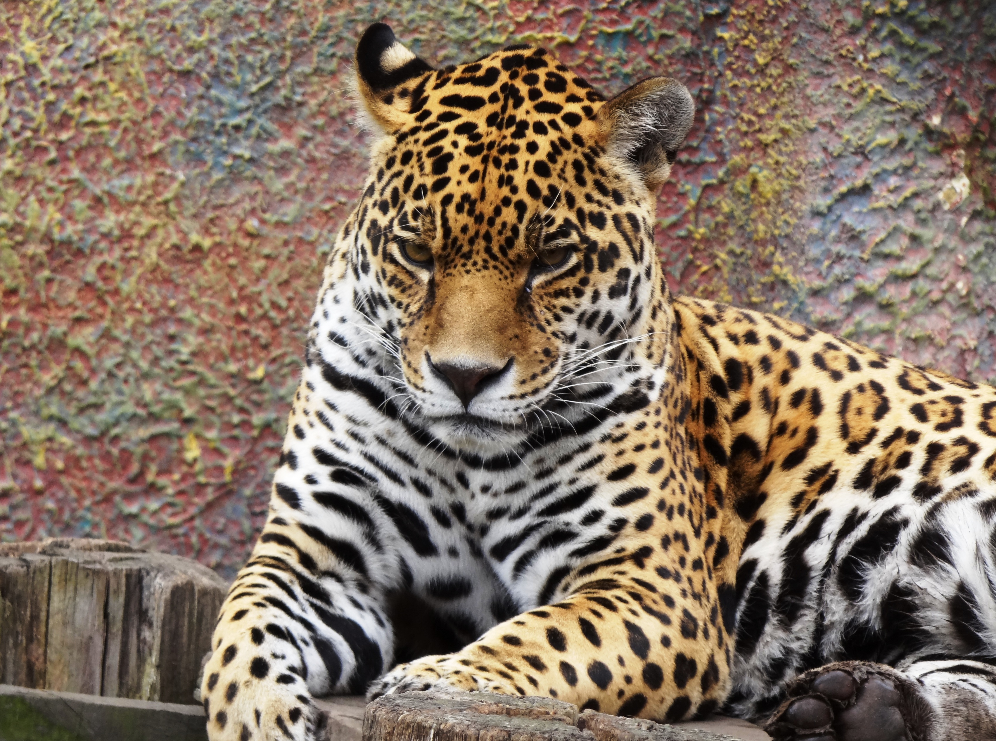 Panthera onca (jaguar) en el zoológico del parque Jaime Duque, Cundinamarca, Colombia